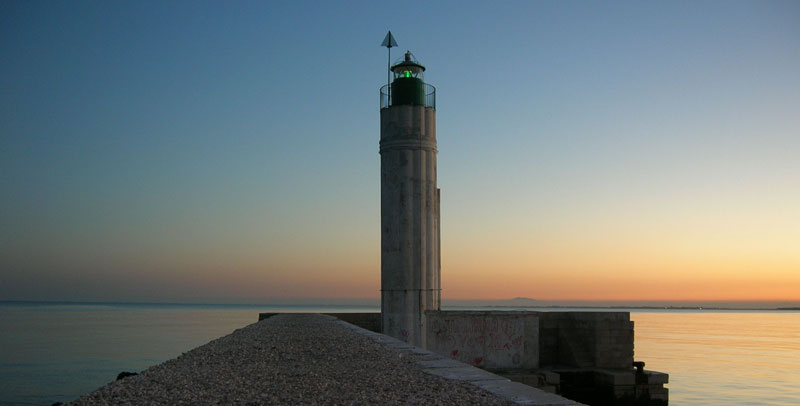 Manfredonia e il suo faro nel Tramonto. - Salvatore Triventi - FotoDaSogno